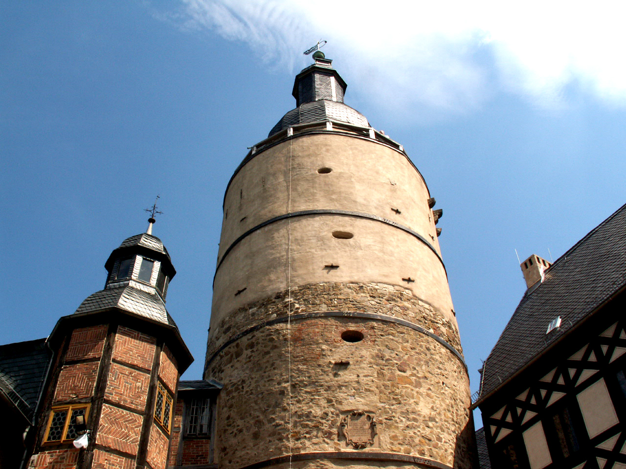 Innenhof der Burg Falkenstein